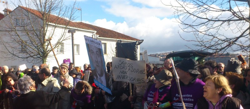 Manifestación de afectados polas preferentes que rematou ás portas da residencia oficial do presidente da Xunta